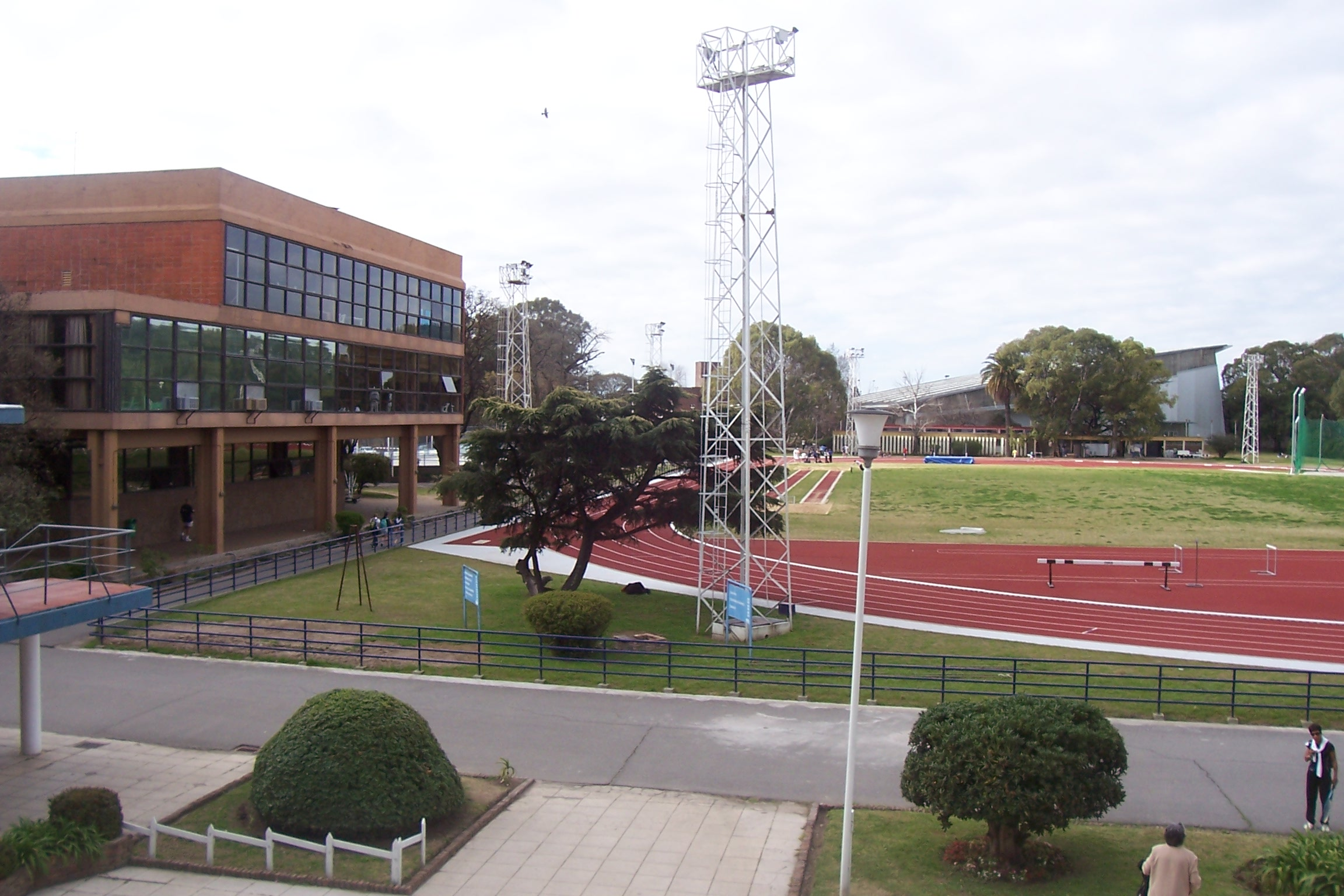 Centro Nacional de Alto Rendimiento Deportivo (CeNARD) en el barrio de Nunéz, en Buenos Aires.